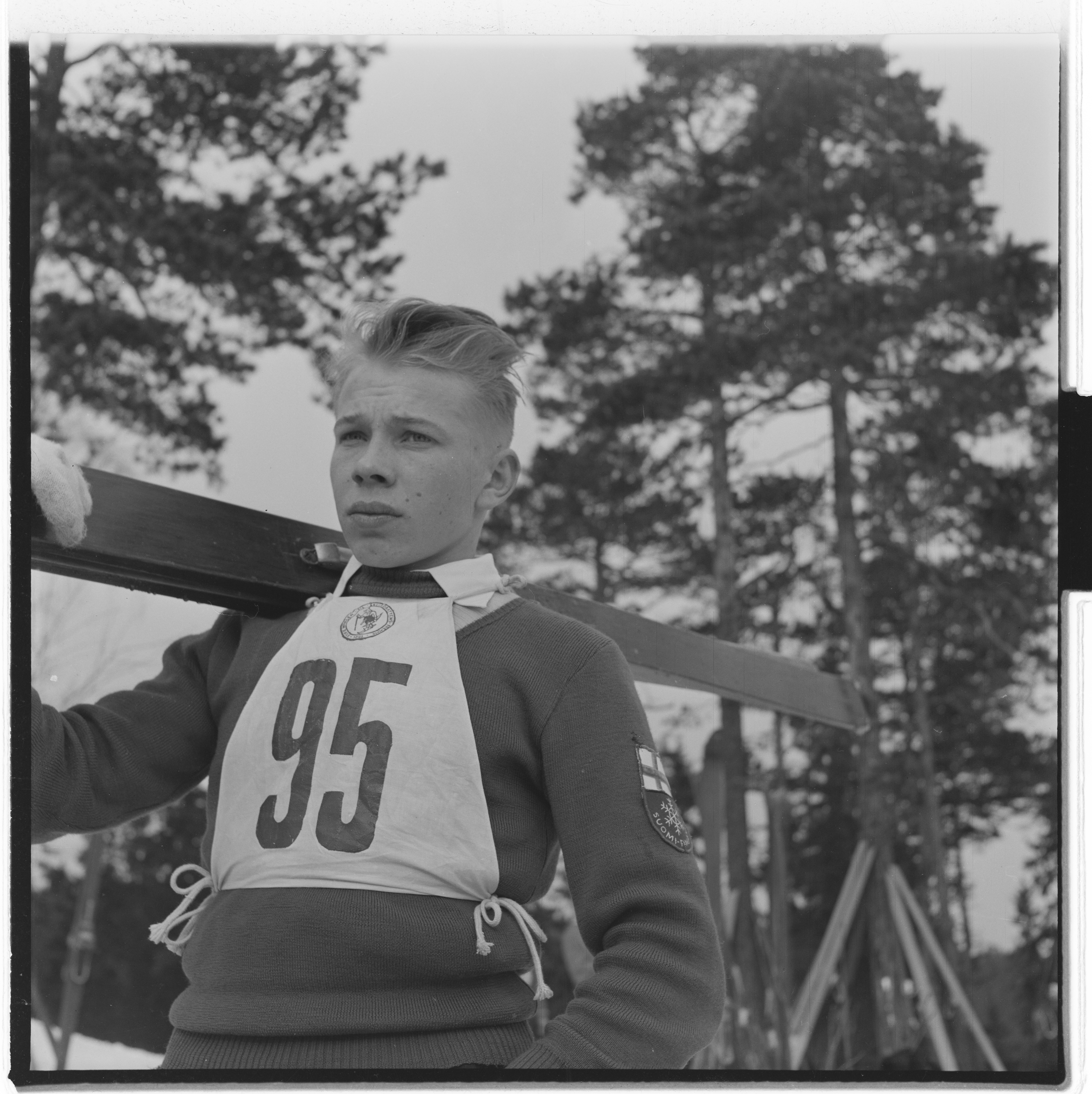 Bildet er hentet fra Arkivverket. Holmenkollen 1953. NÅ nr. 5, 1953 Arkivinstitusjon : Riksarkivet Arkivnavn : Billedbladet NÅ Sted : Norge, Oslo, Oslo, Holmenkollen Emneord: Holmenkollen, Ski, Vintersport, Hopp, Skihopp, Skihoppere, Hopprenn Avbildet: Kirjonen, Eino